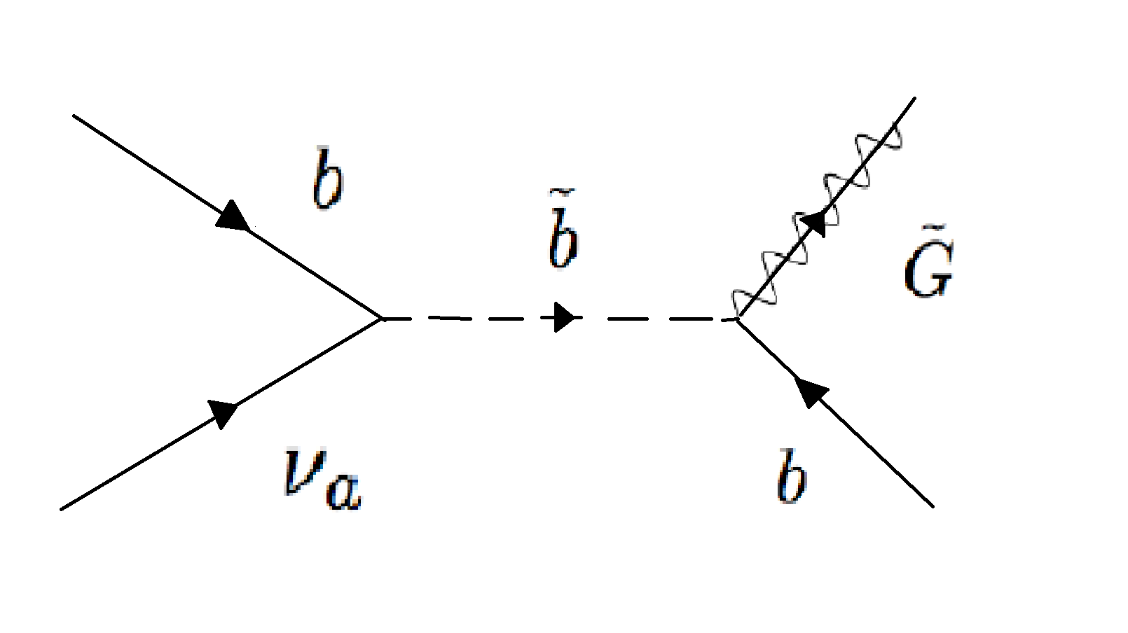 về gravitino